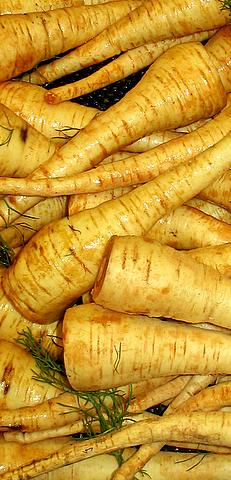 Parsnips at Kroger.